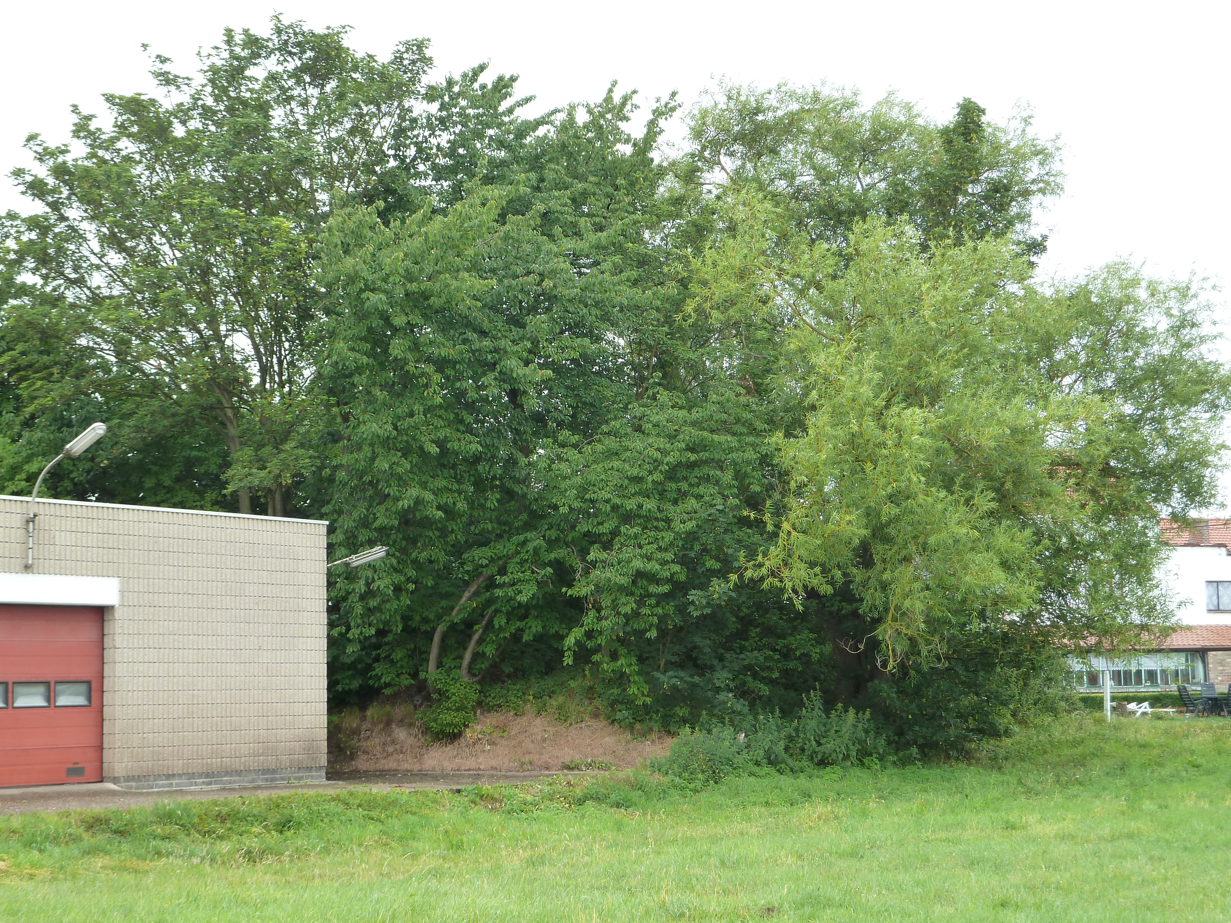 Tumulus de Waremme, Belgique